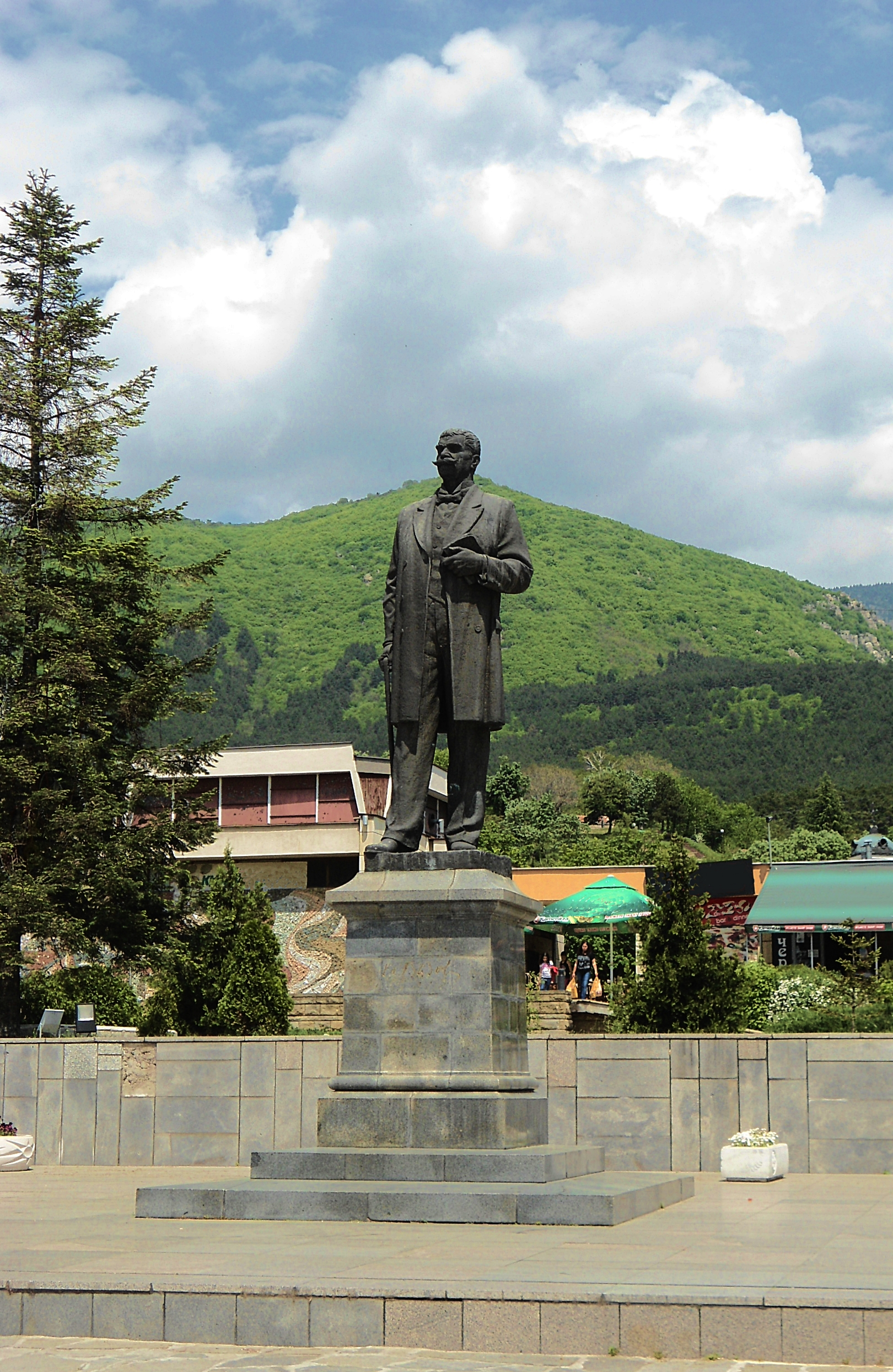 Паметникът на Иван Вазов в Сопот